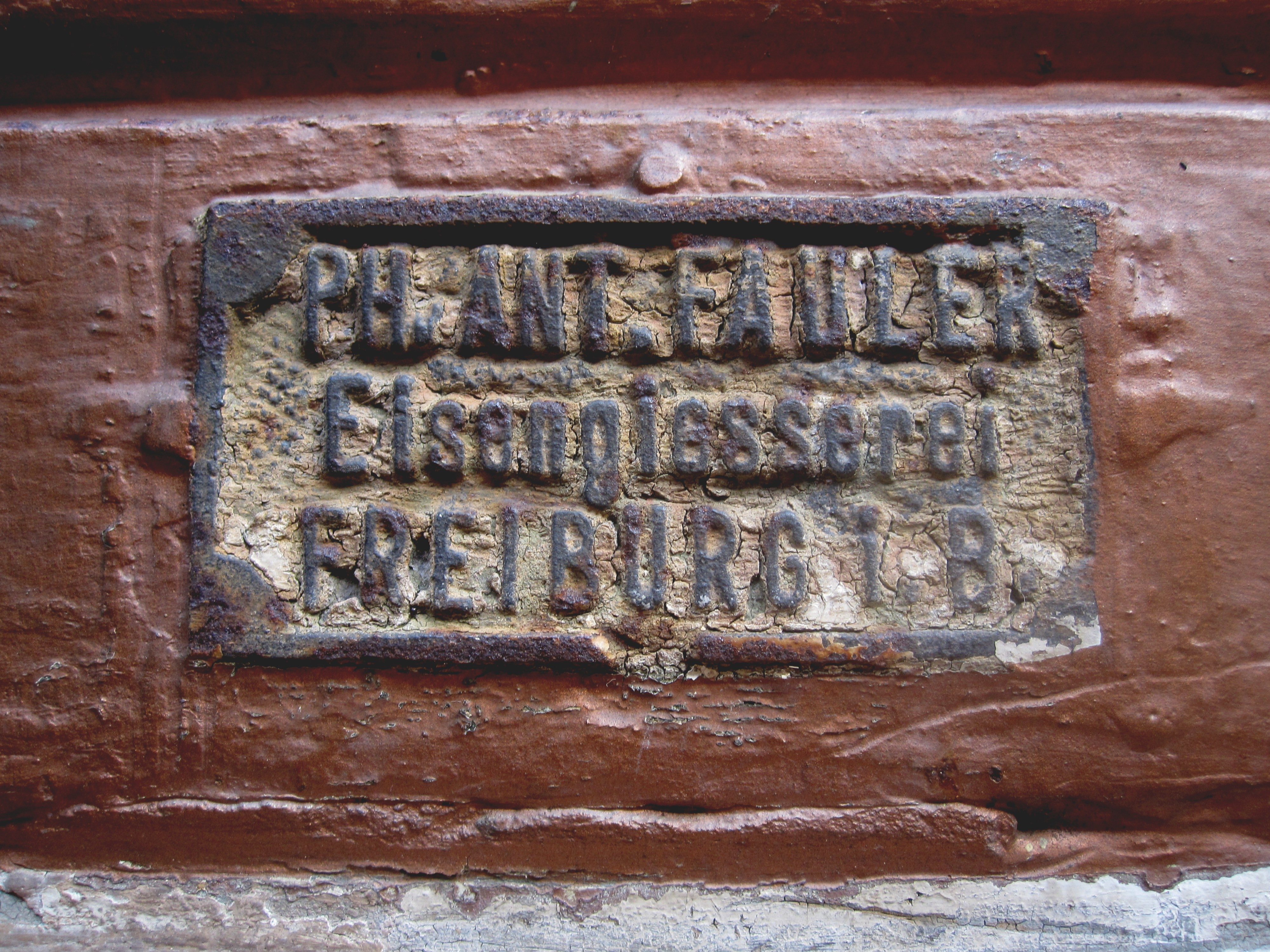 Beispiel für Eisenguss der Eisengießerei Ph. Ant. Fauler Freiburg im Breisgau Plakette an einer der beiden Säulen